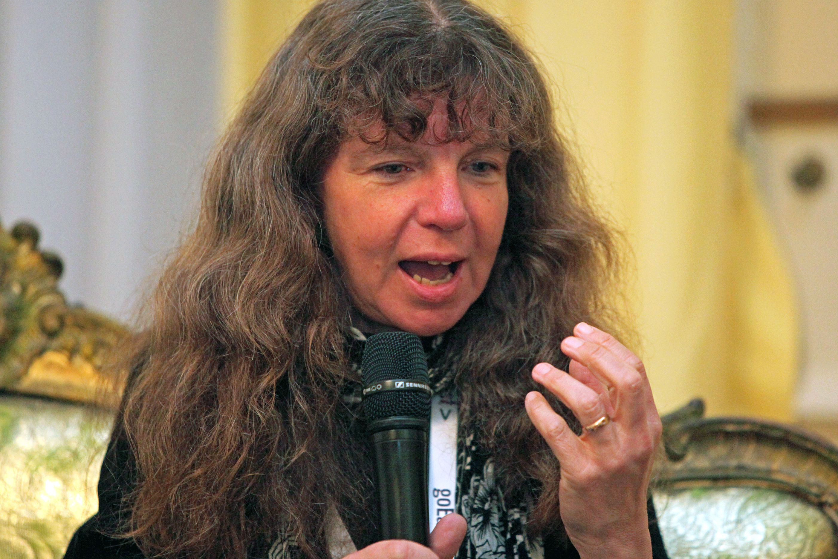 Die lettische Filmregisseurin Laila Pakalniņa in Wiesbaden am 25. April 2016.